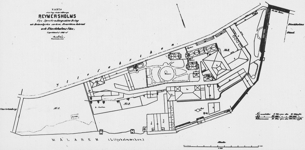 Reymersholms Nya Spritförädlings AB fabriksområde på Reimersholme